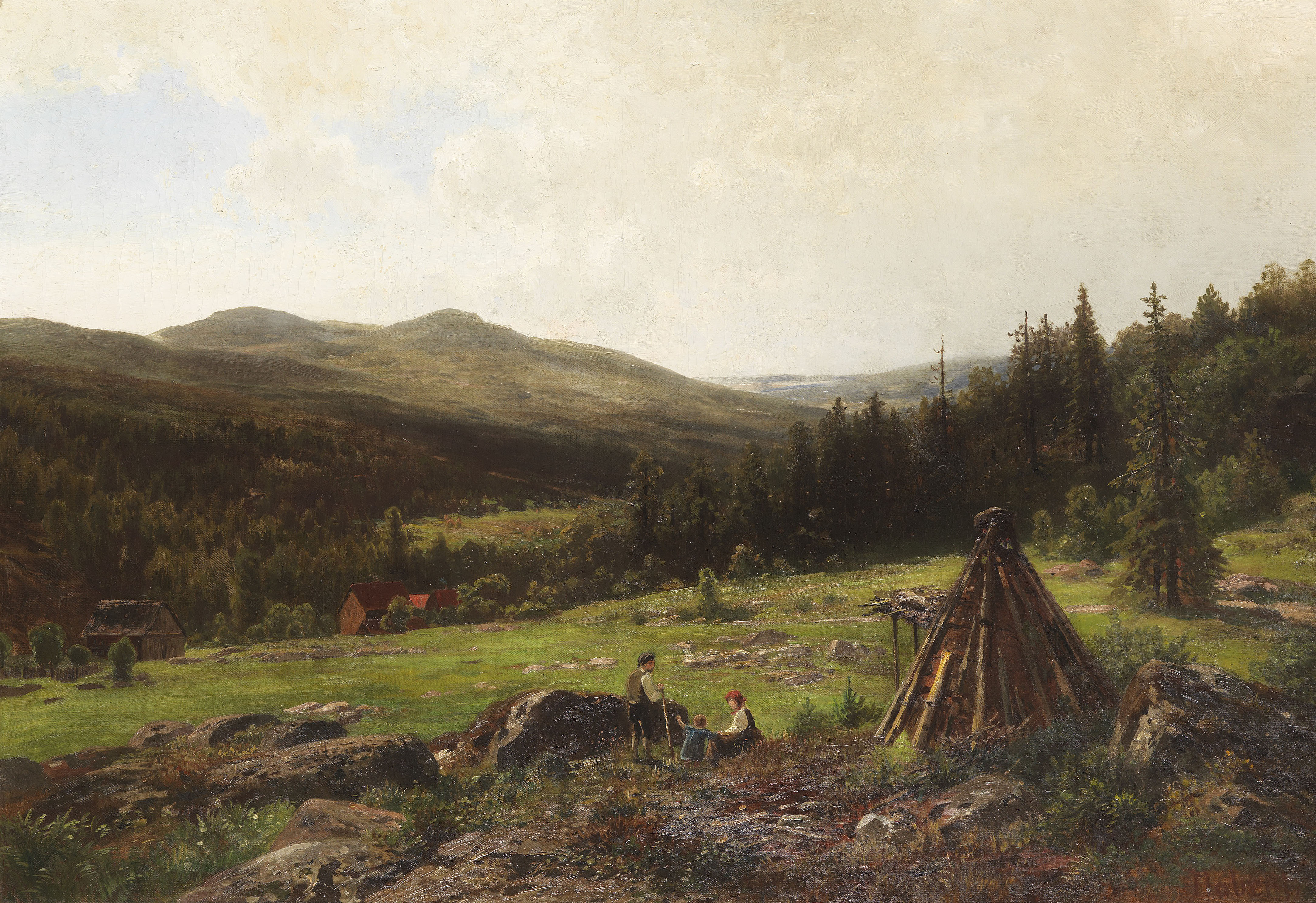 Köhlerfamilie vor weiter Hügellandschaft. 2. Hälfte 19. Jahrhundert. Öl auf Leinwand. Rechts unten signiert. 75,5 x 108,5 cm